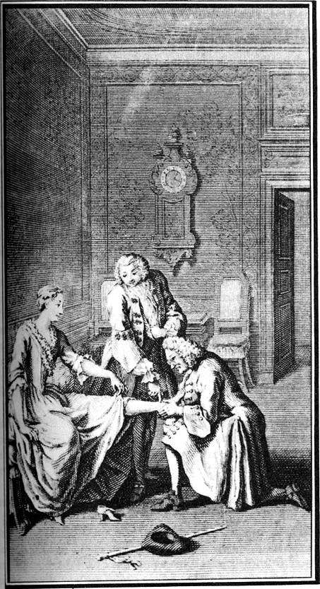 La Vie de Marianne by Pierre de Marivaux (1688-1763)